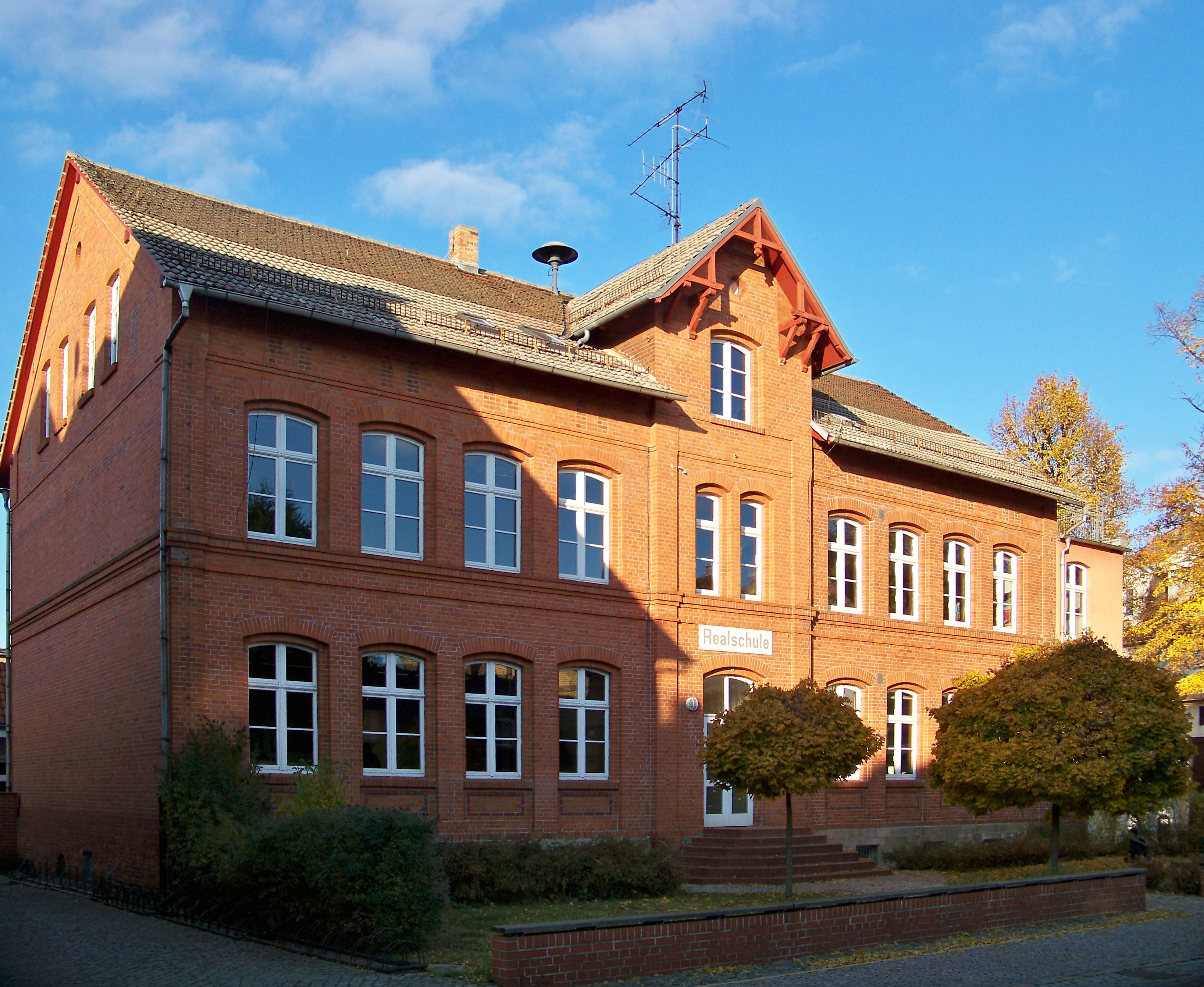 Realschulgebäude in Falkenberg (Elster)